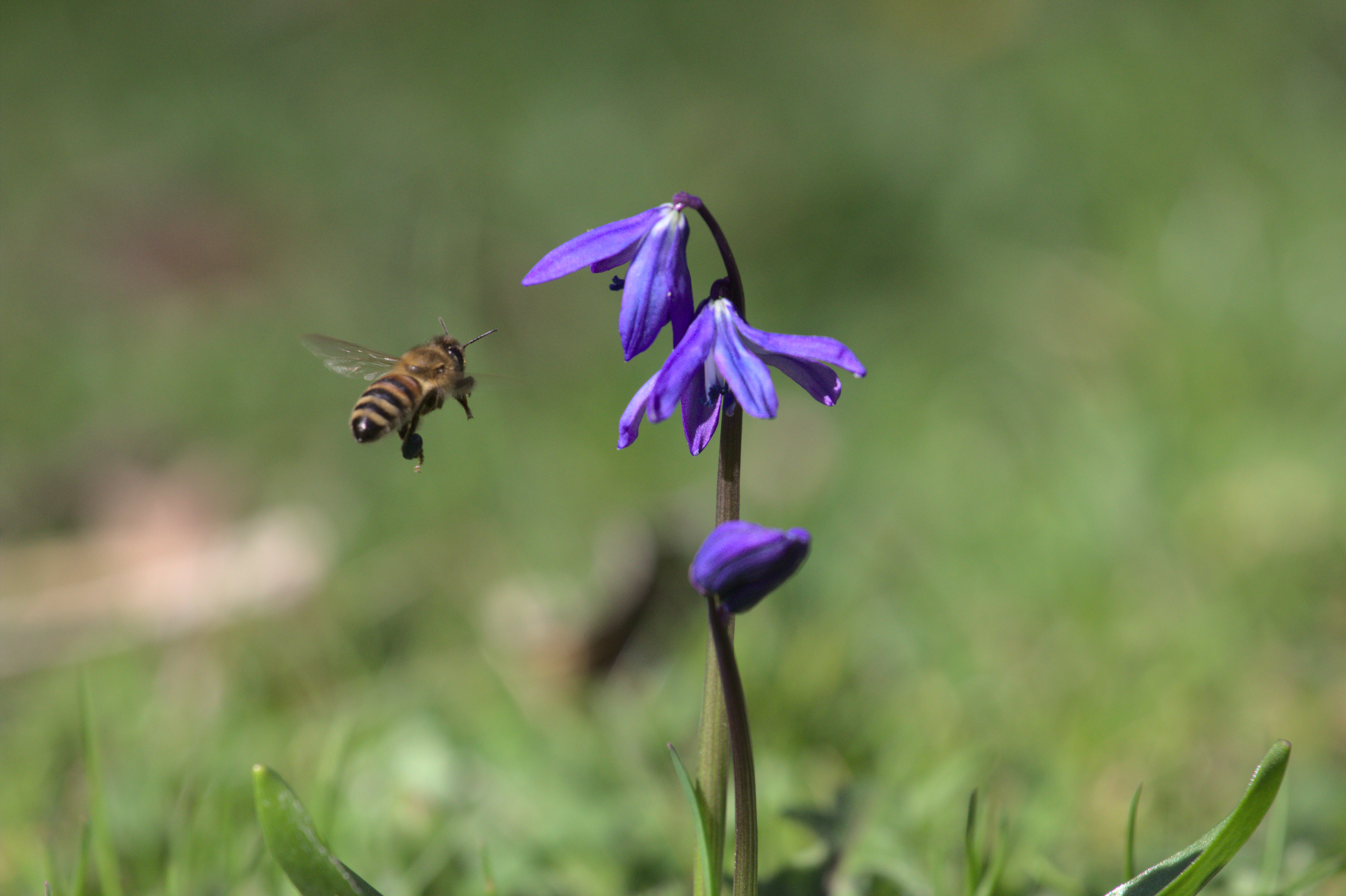 Blausternchen mit Honigbiene an der Isar südlich von München